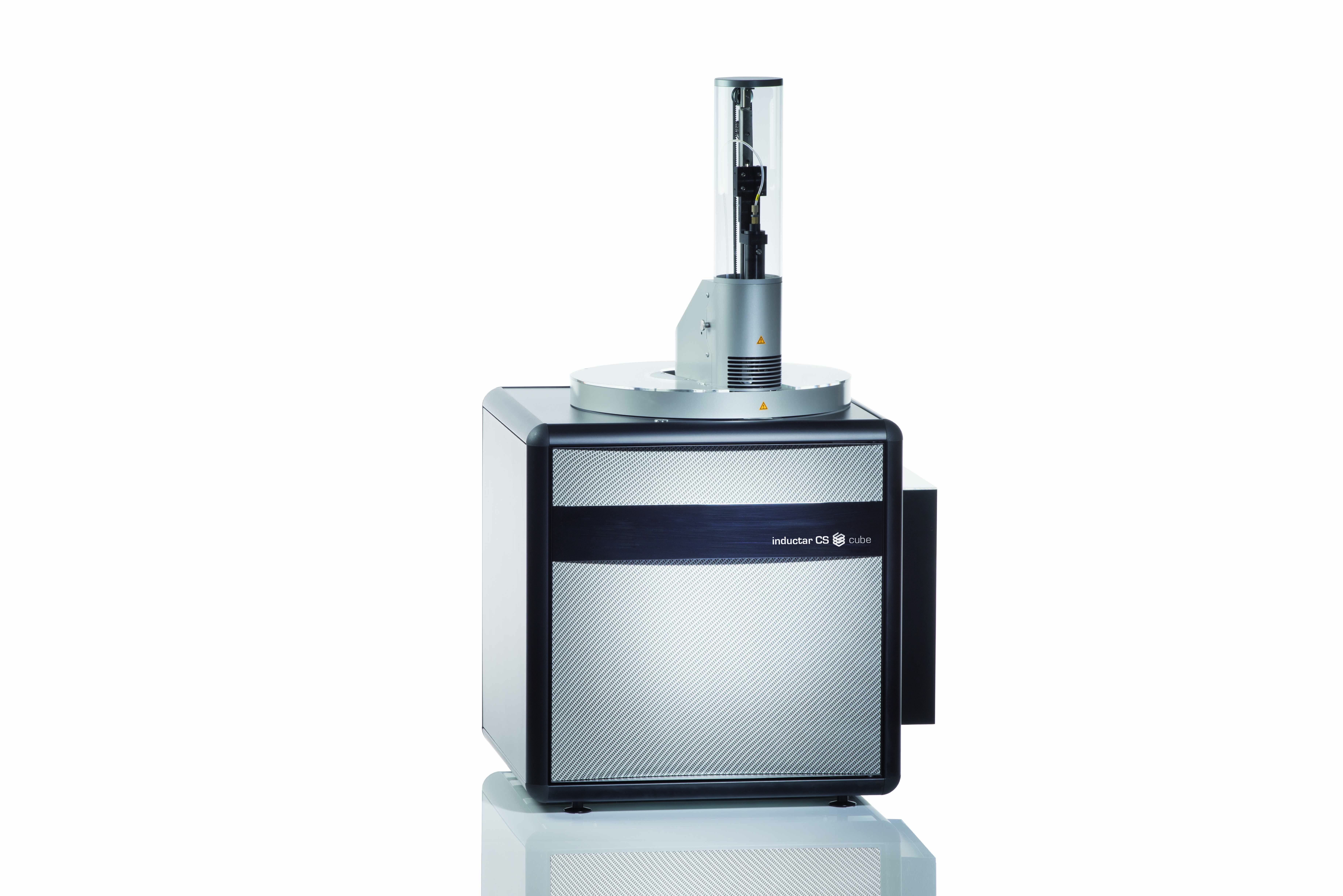 Analyseur CS de dernière génération de marque Elementar nommé "Inductar CS" avec passeur automatique de 89 positions